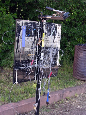 Free Bike Tools, in Denver, Colorado, US